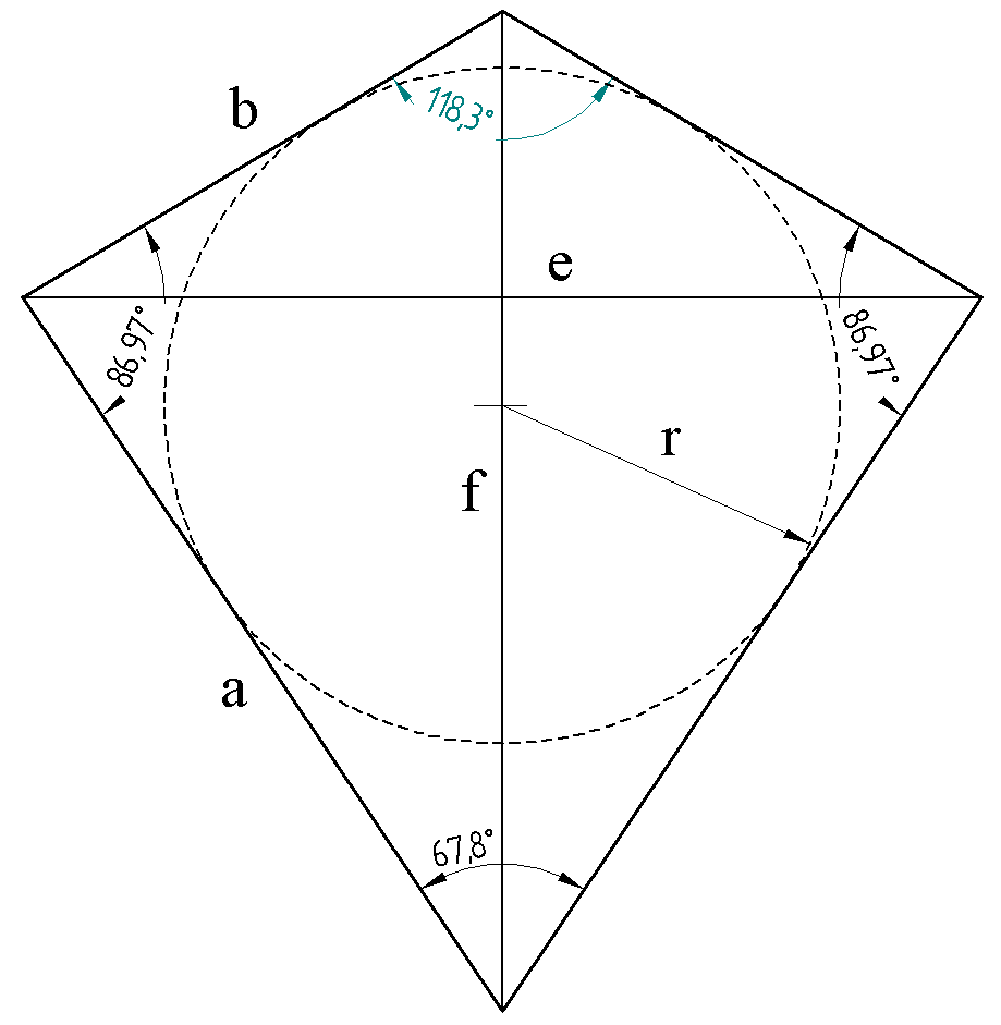 Größen im Drachenviereck des Deltoidalhexakontaeders